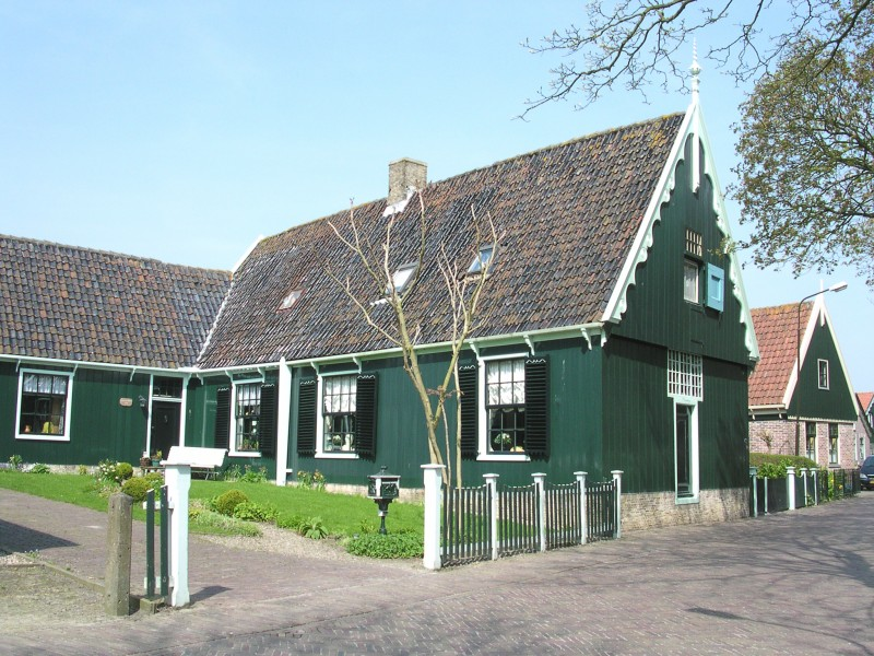 Een typerend Westfriese (ook wel Zaanse genoemd) huis in Twisk A typical West Frisian house in Twisk